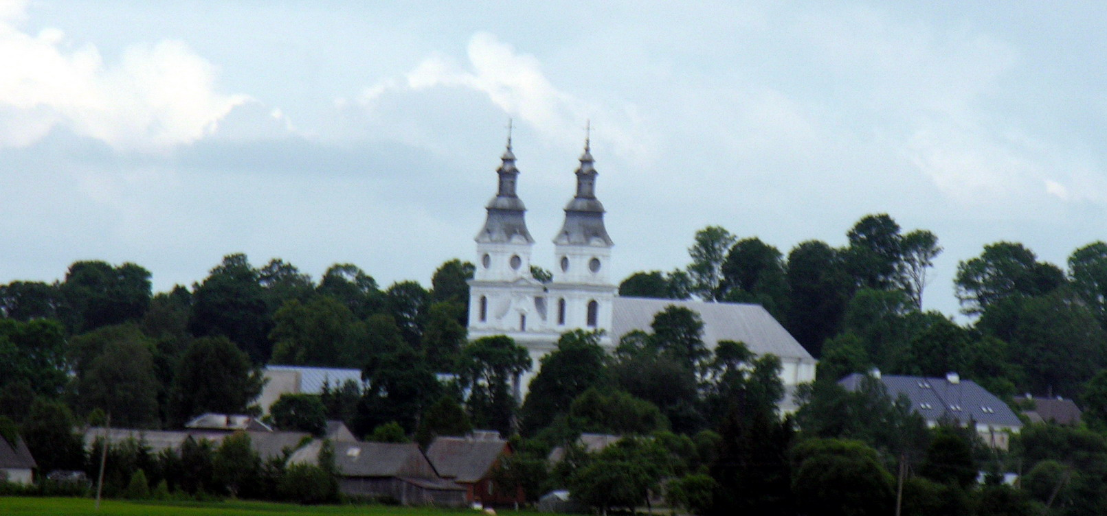 Žemaičių Kalvarija Foto: Algirdas, 2006 m. birželio 29 d. Fotografuota nuo Plungės-Mažeikių plento iš važiuojančios transporto priemonės pro langą.